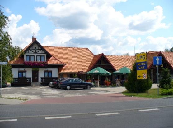 Ogonki k. Węgorzewa